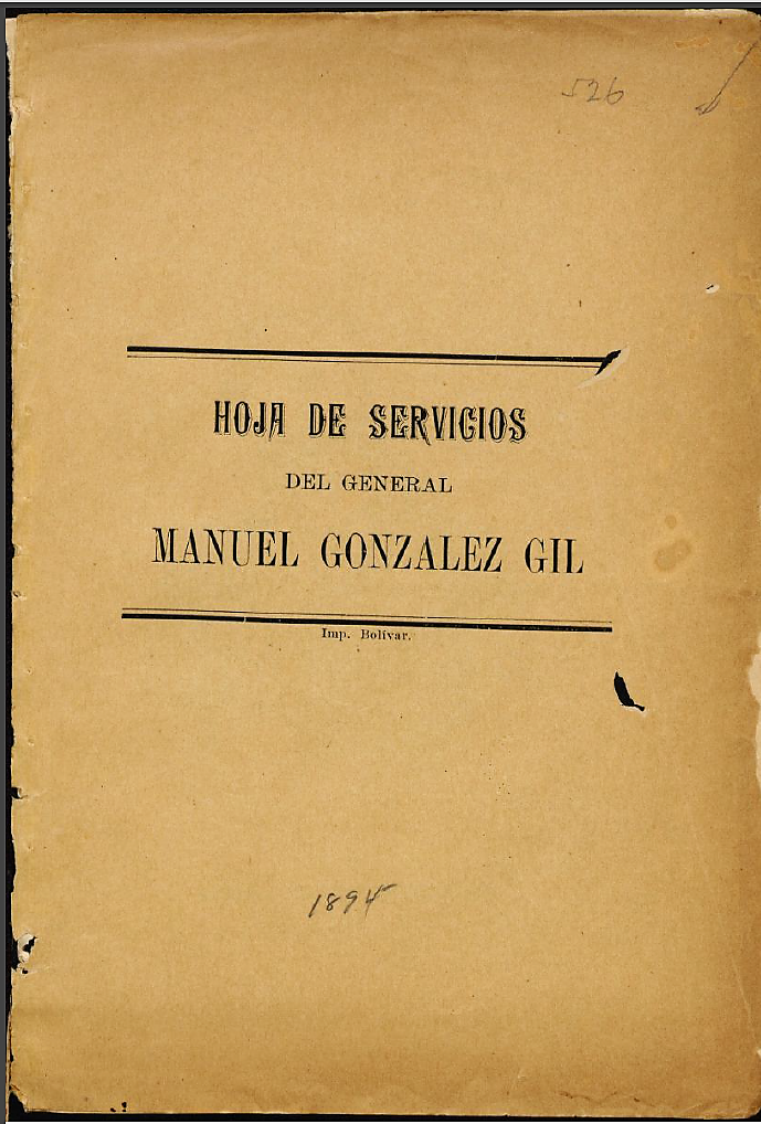 Publicada originalmente como fulleto es la hoja de servicios del general Manuel González Gil redactada por Manuel Landaeta Rosales en 1893